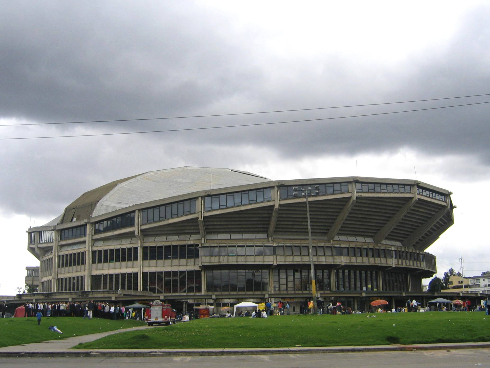 Coliseo El Campin de Bogota